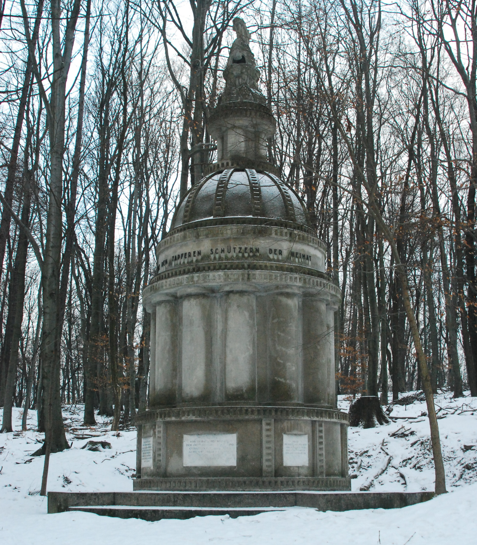 Das Wienerwald-Heldendenkmal in Weidlingbach (Klosterneuburg) in Niederösterreich.